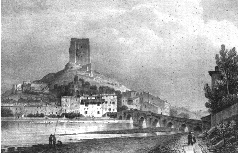 Crest (Drôme).